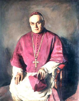 brněnský biskup Josef Kupka